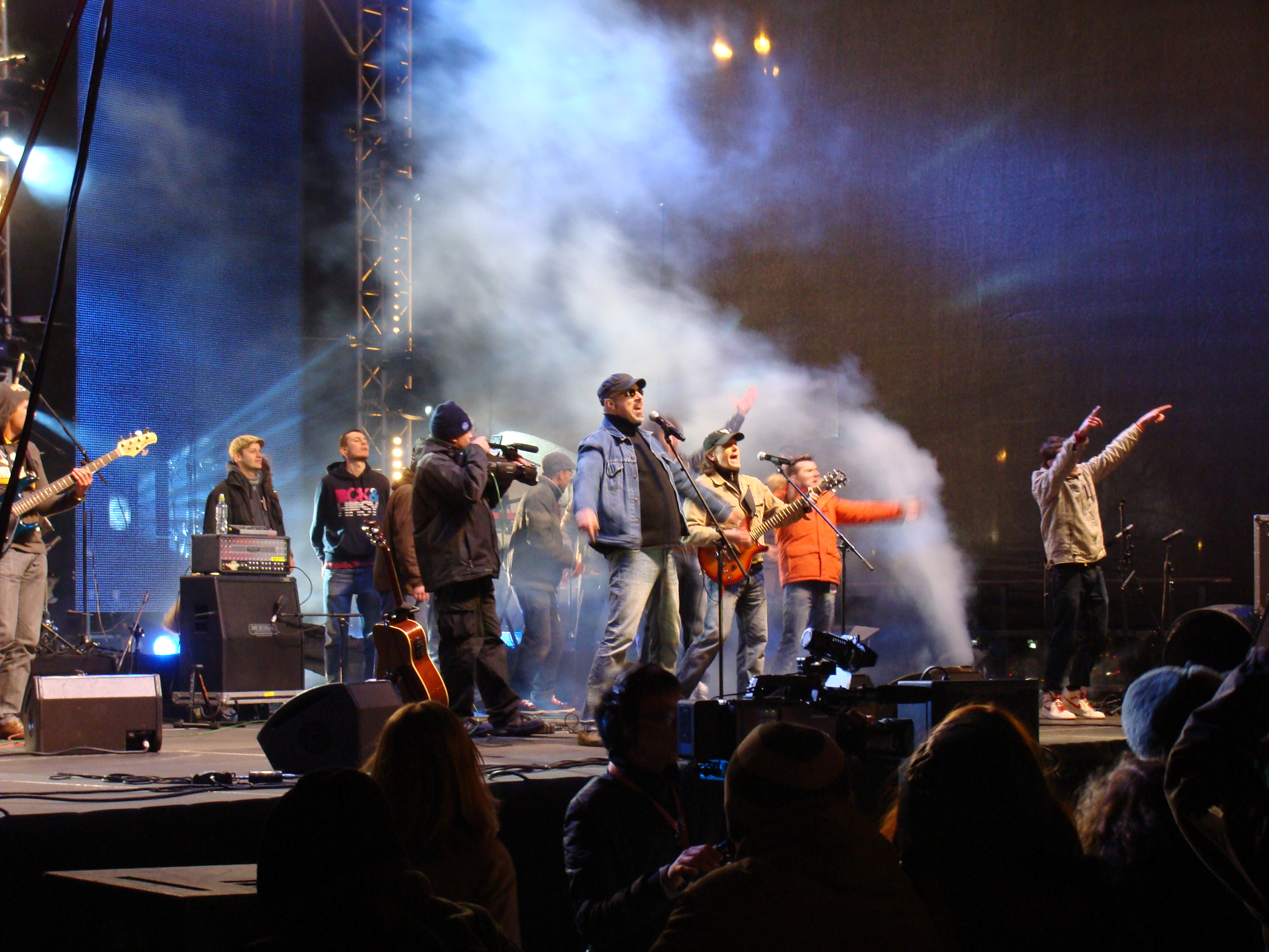 Koncert "Solidarni z Białorusią" 27 marca 2011 roku na placu Defilad w Warszawie.